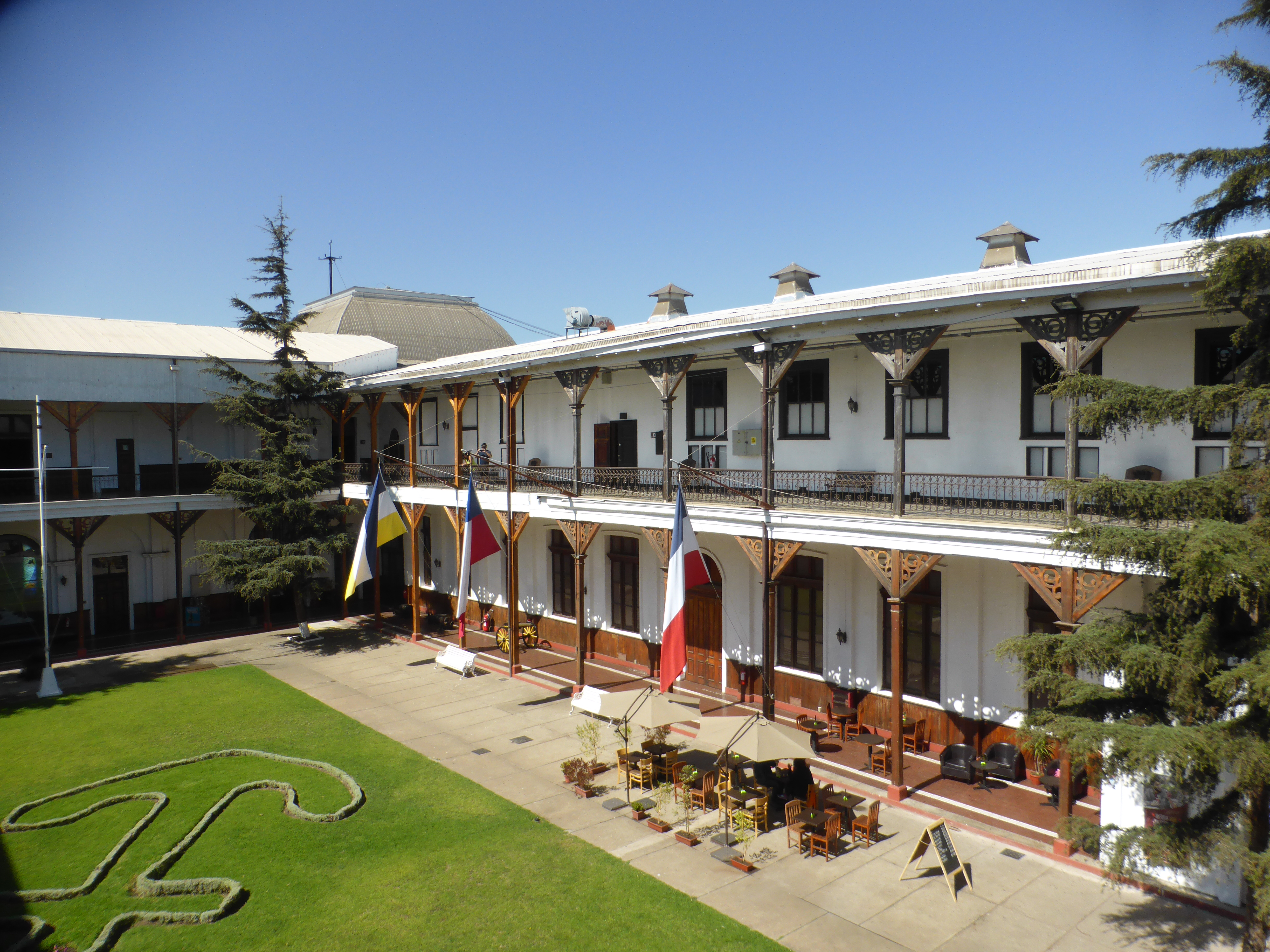 Sede actual del Museo Marítimo Nacional, en Valparaíso, Chile. Patio rectangular con pilares de madera. Edificio Almirante Luis Uribe Orrego.